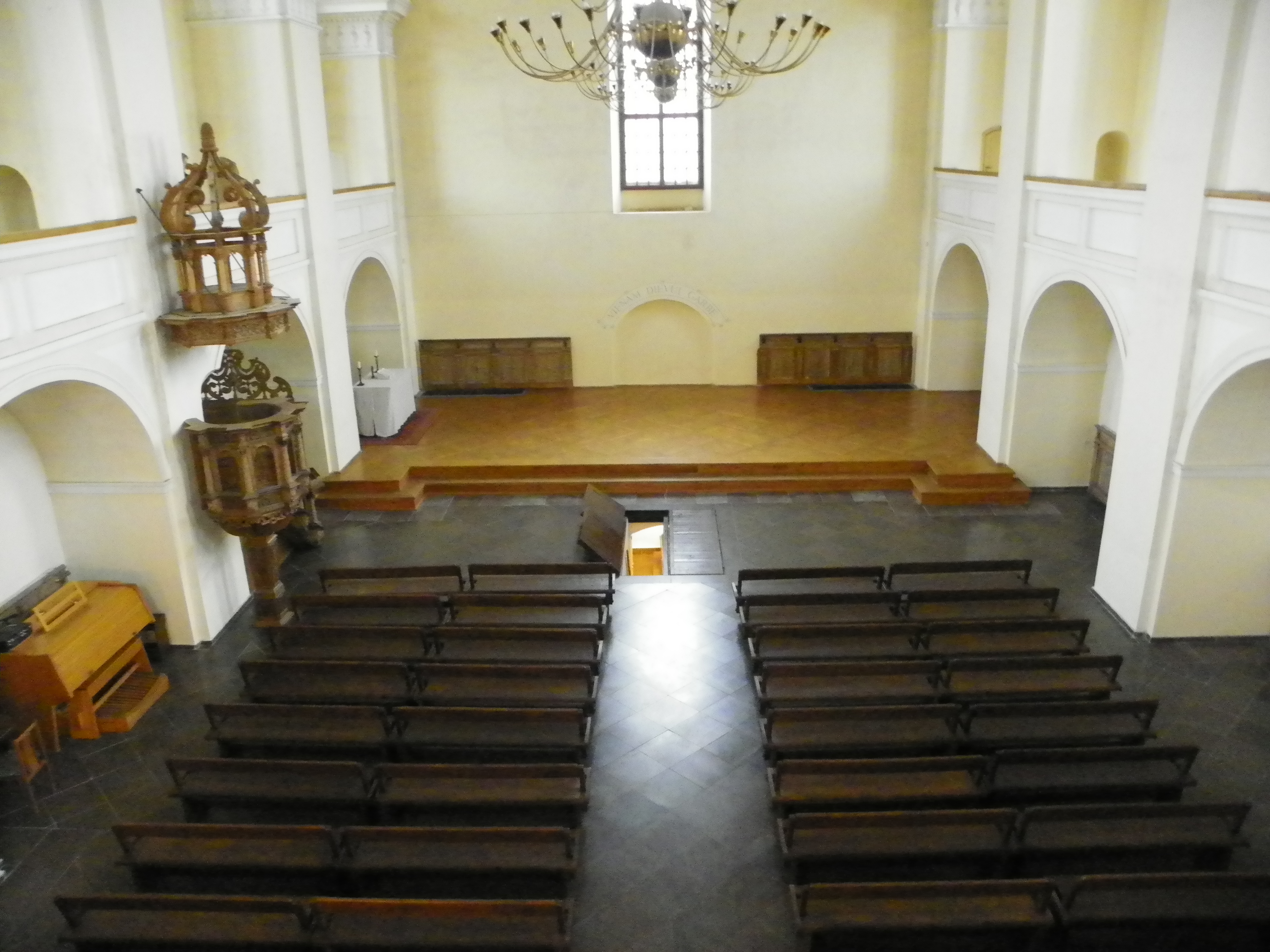 Kėdainių evangelikų reformatų bažnyčios interjeras